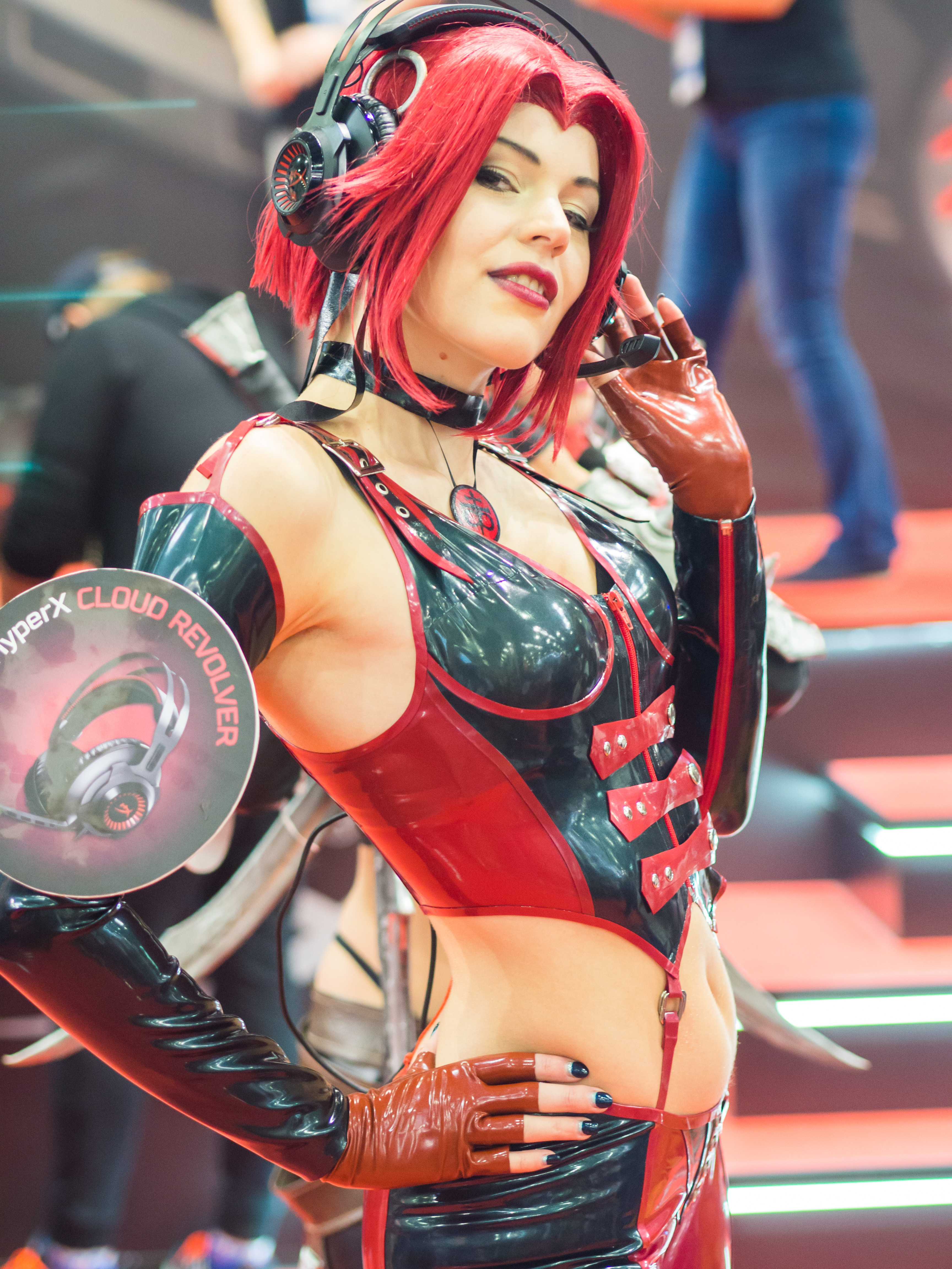 day 3